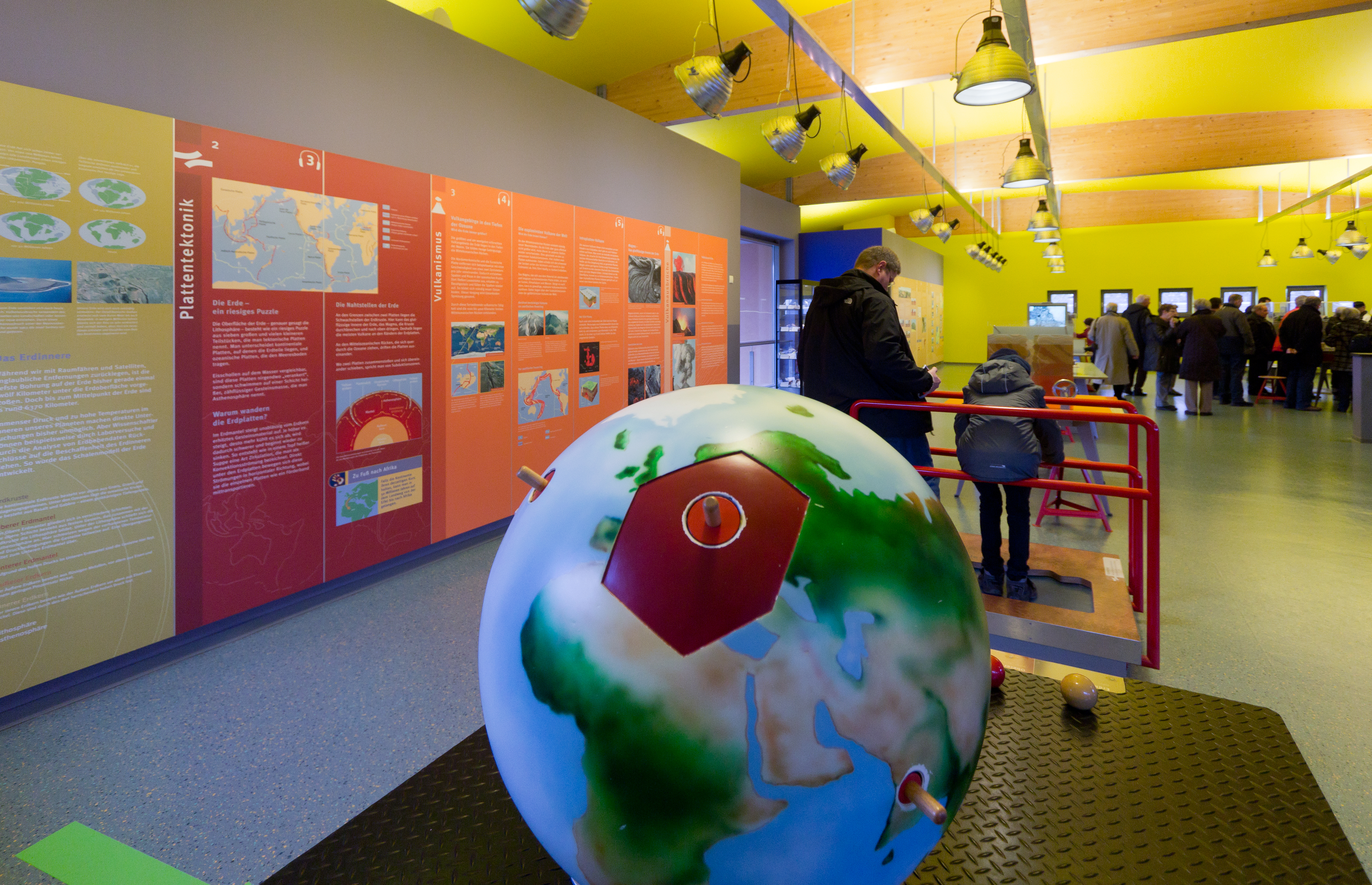 Lava-Dome – Deutsches Vulkanmuseum Mendig, Ausstellungsbereich „Vulkanwerkstatt“